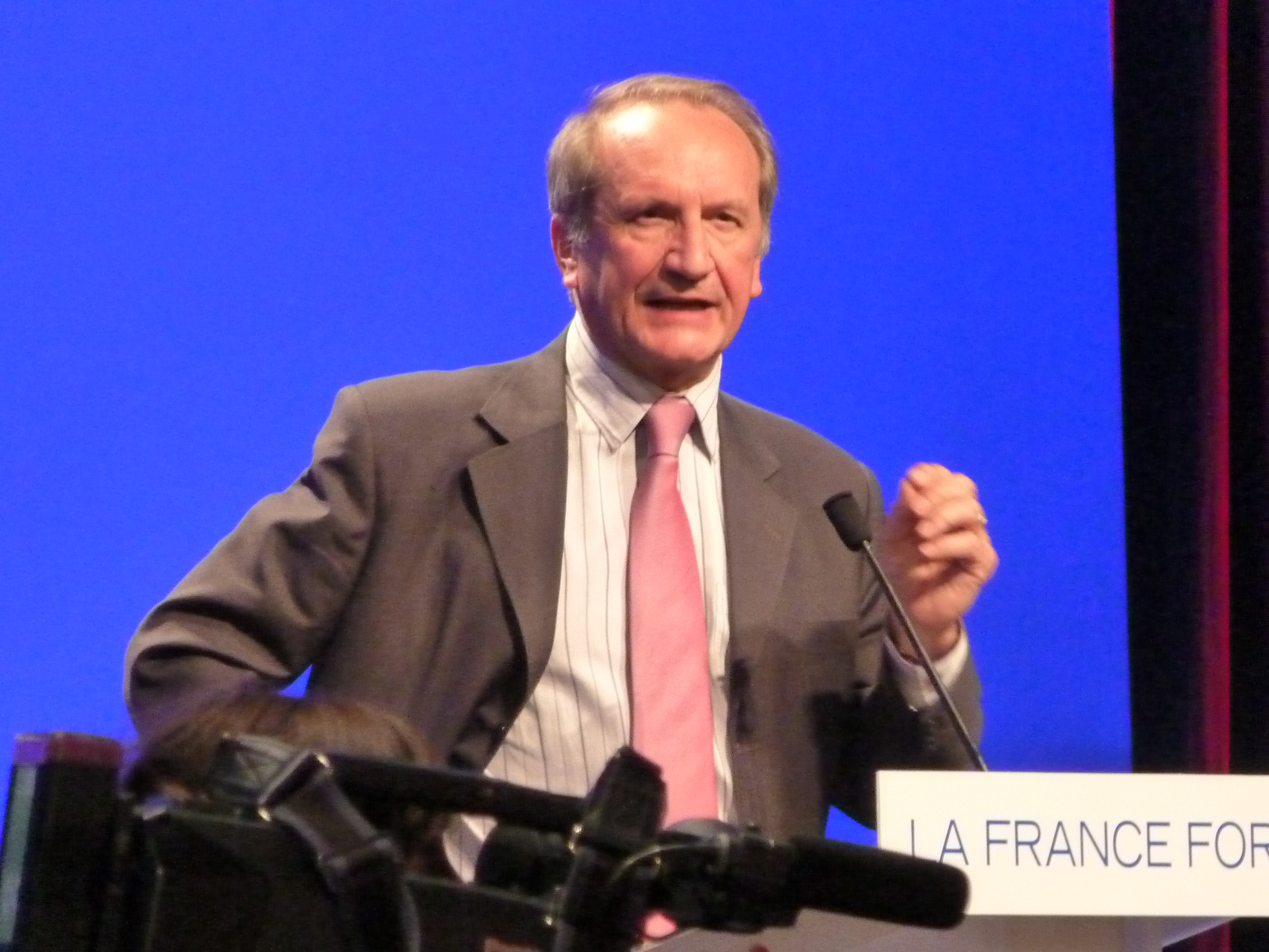 Gérard Longuet à un meeting de Nicolas Sarkozy, le 2 avril 2012, à Nancy.